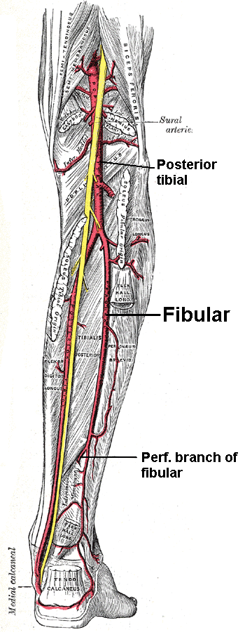 Arteria fibular.